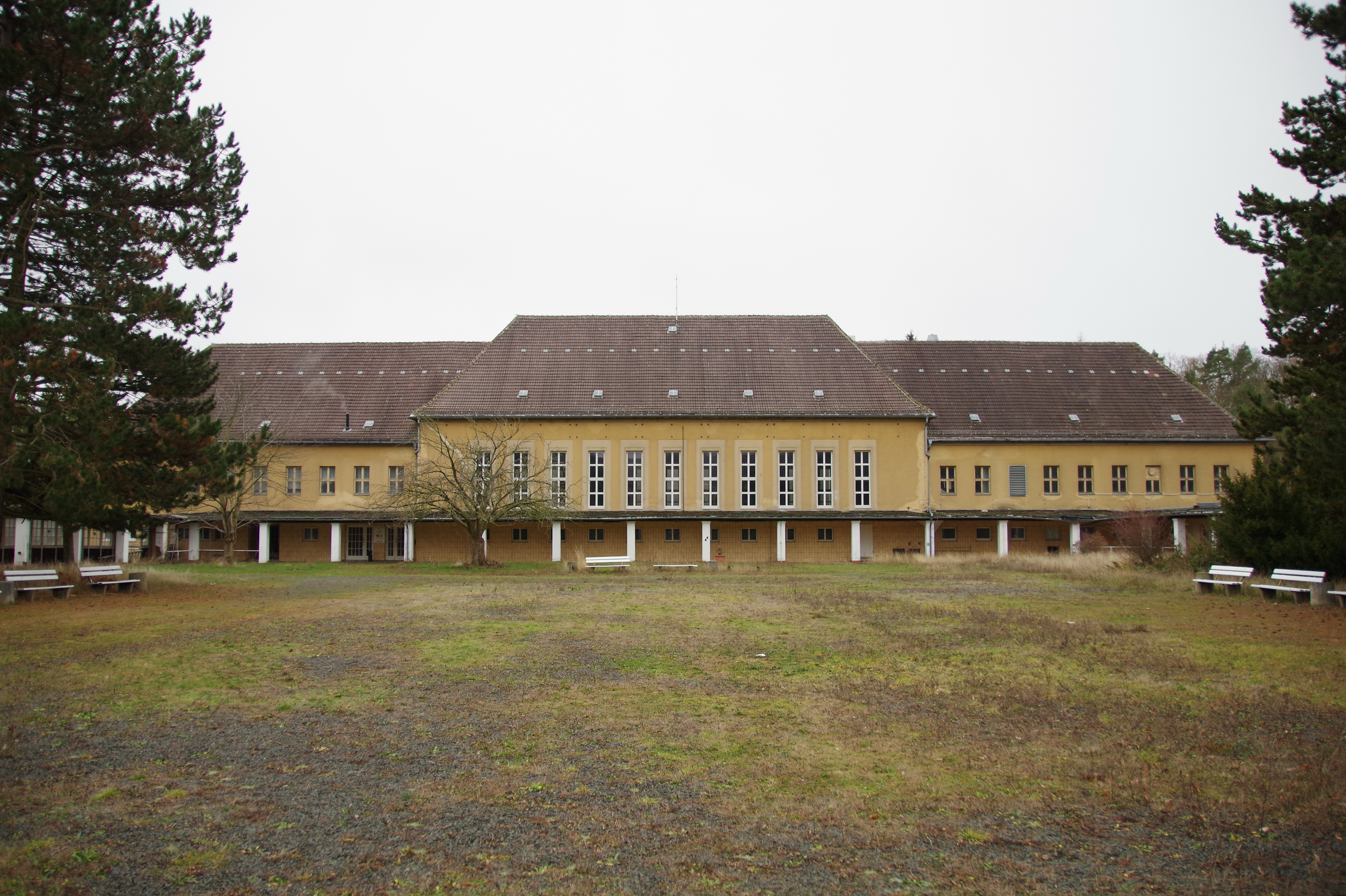 ehemalige Napola und spätere Bezirksparteischule auf dem Großen Ziegenberg in Ballenstedt